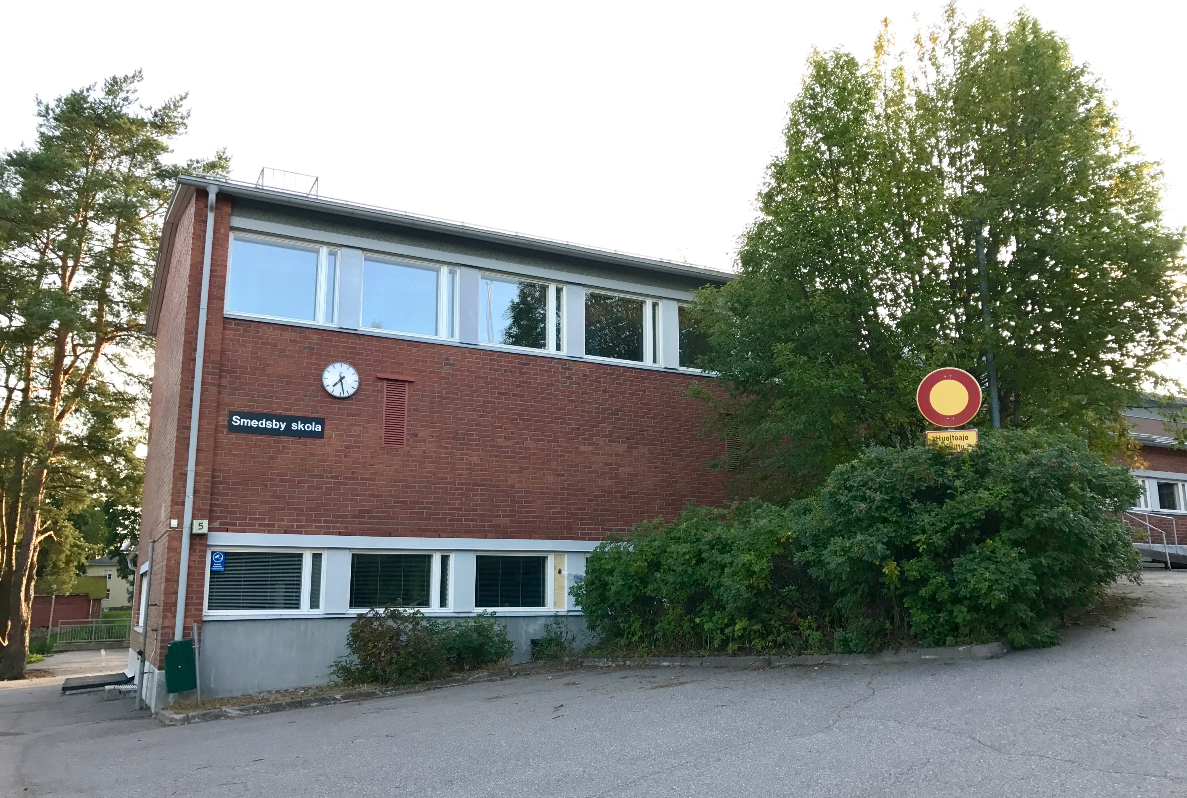 Smedsbyn koulu Espoossa.